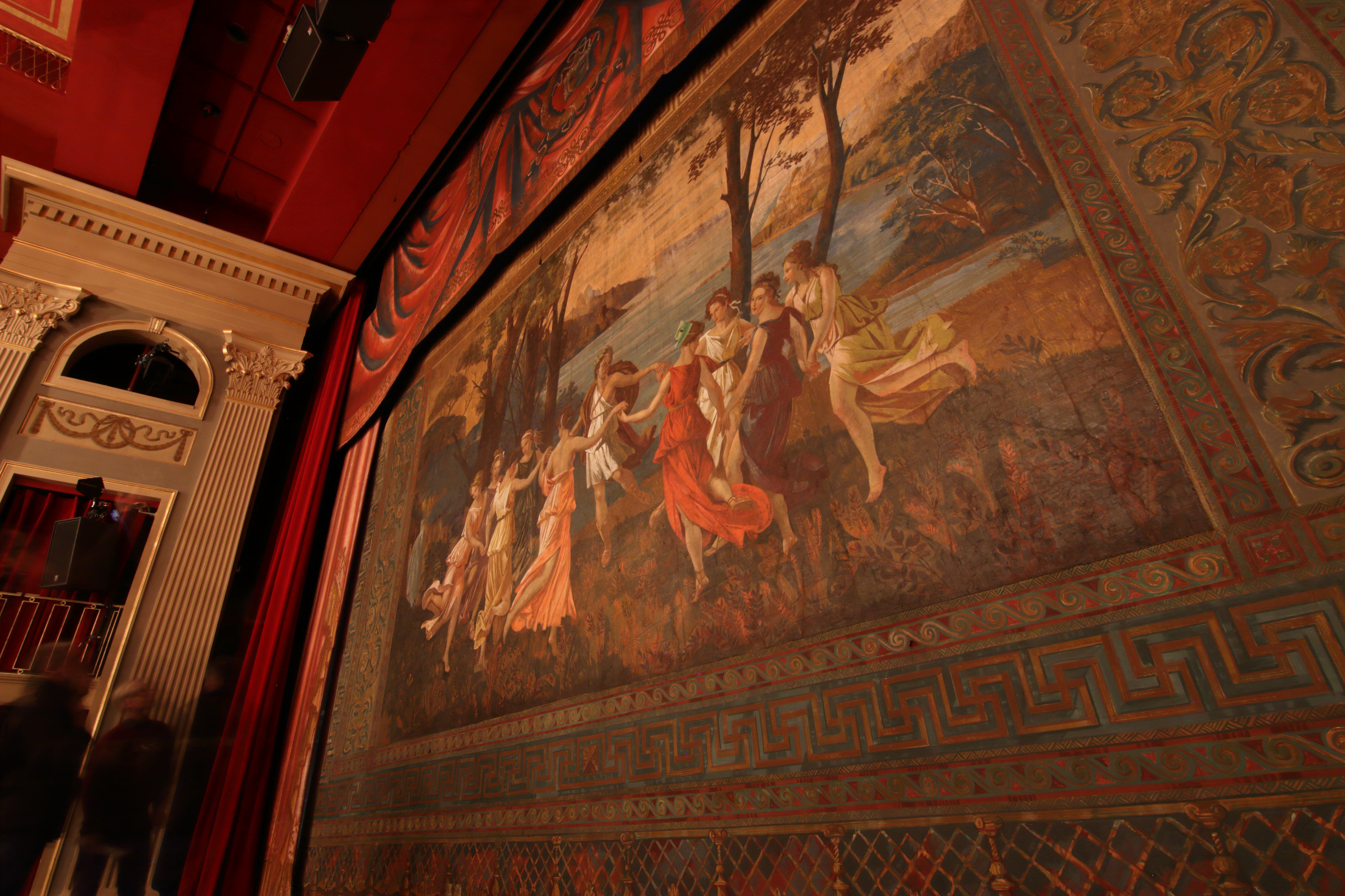 Historischer Vorhang des Stadttheaters Kempten